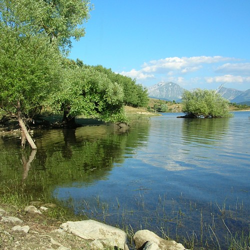 Lago di Campotosto (Provincie l'Aquila)